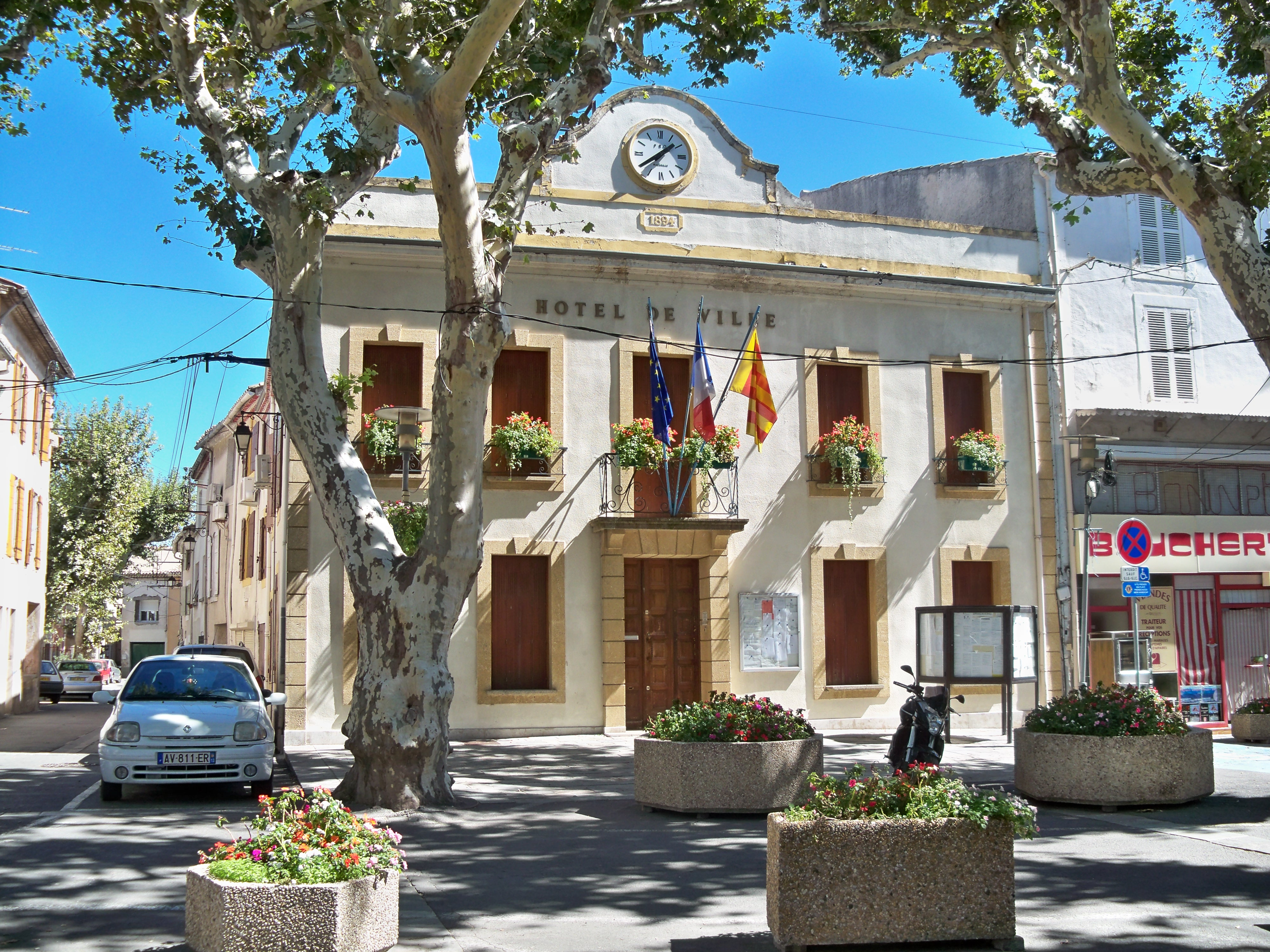 Mairie de Sénas, Bouche du Rhône, France